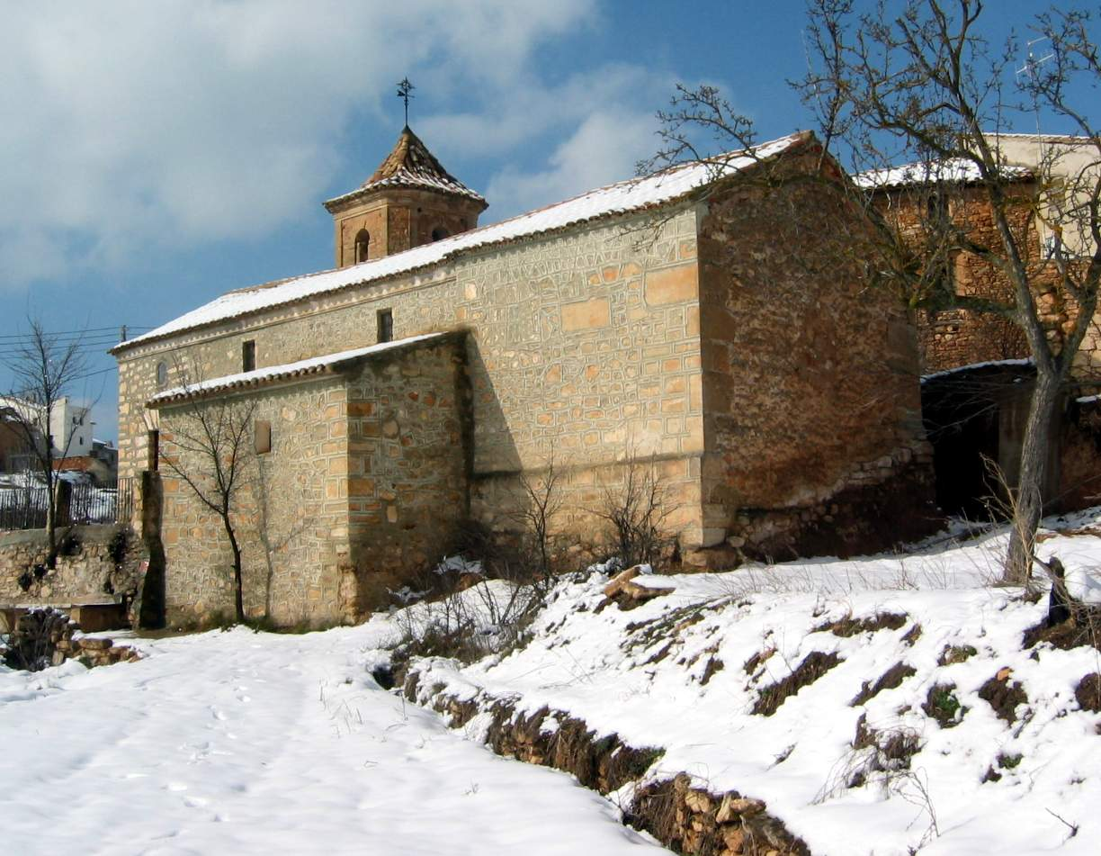 Vista posterolateral de la parroquial de Santa Bárbara en Mas del Olmo, Ademuz (Valencia).